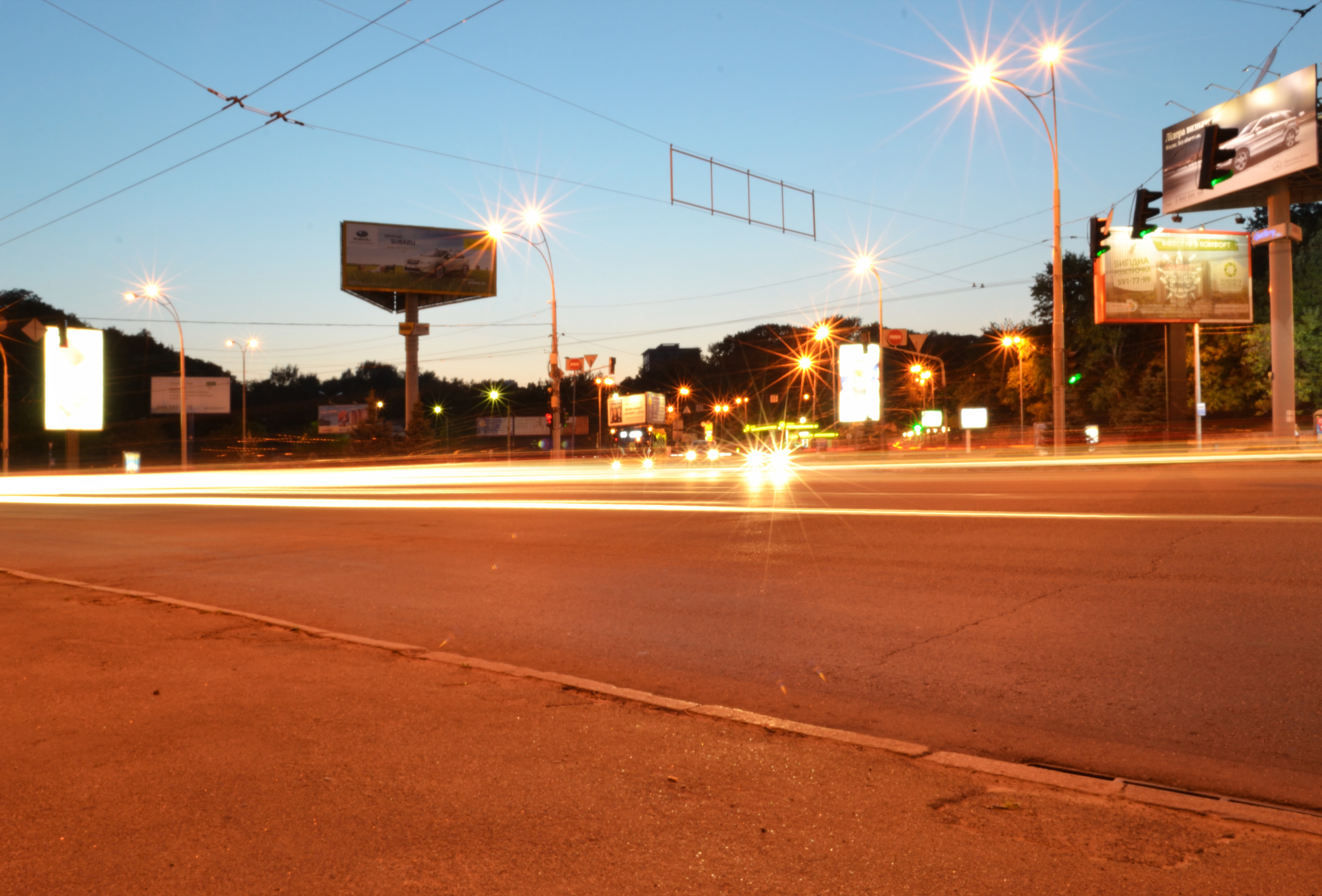 Площа Героїв Великої Вітчизняної війни в Києві